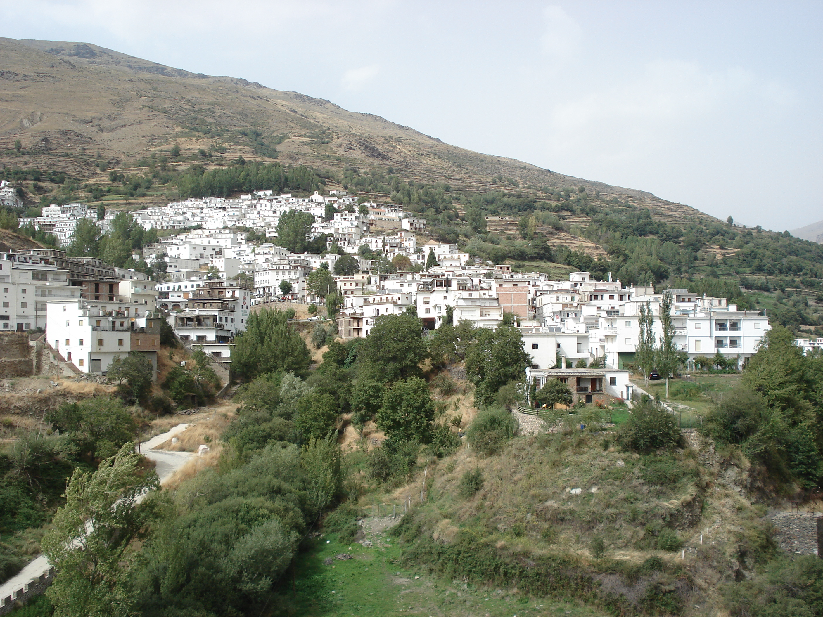 Trevélez, en Granada (España)